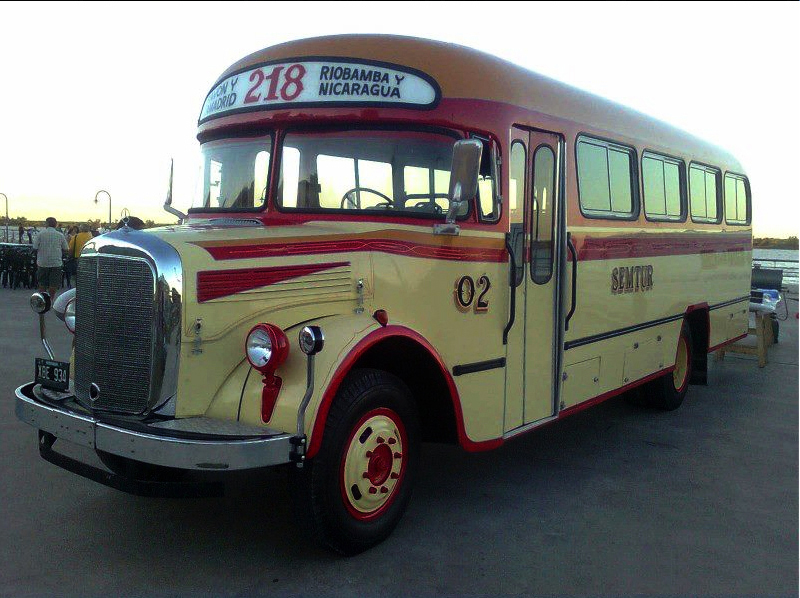 El Colectivo en su máxima expresión - Chasis LO 3500 circa 1963